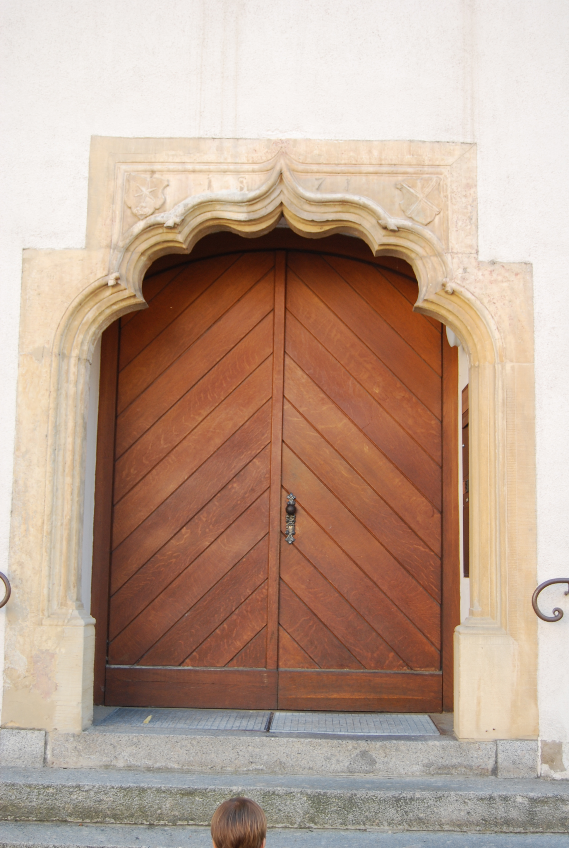 Eingang zum ehemaligen Abteigebäude des Stifts Säckingen